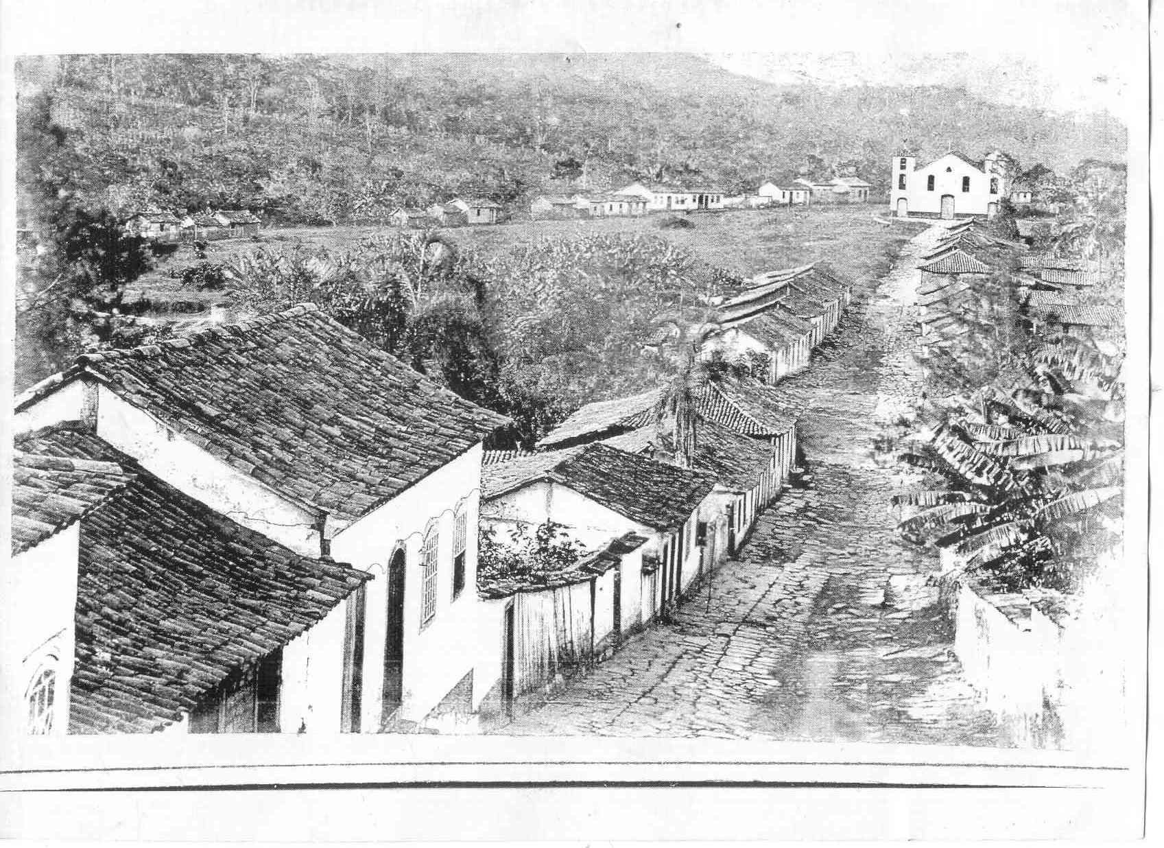 Fotografia da Igreja de Nossa Senhora do Rosário dos Pretos, de Pirenópolis. Construída em 1743 e demolida na década de 1940.